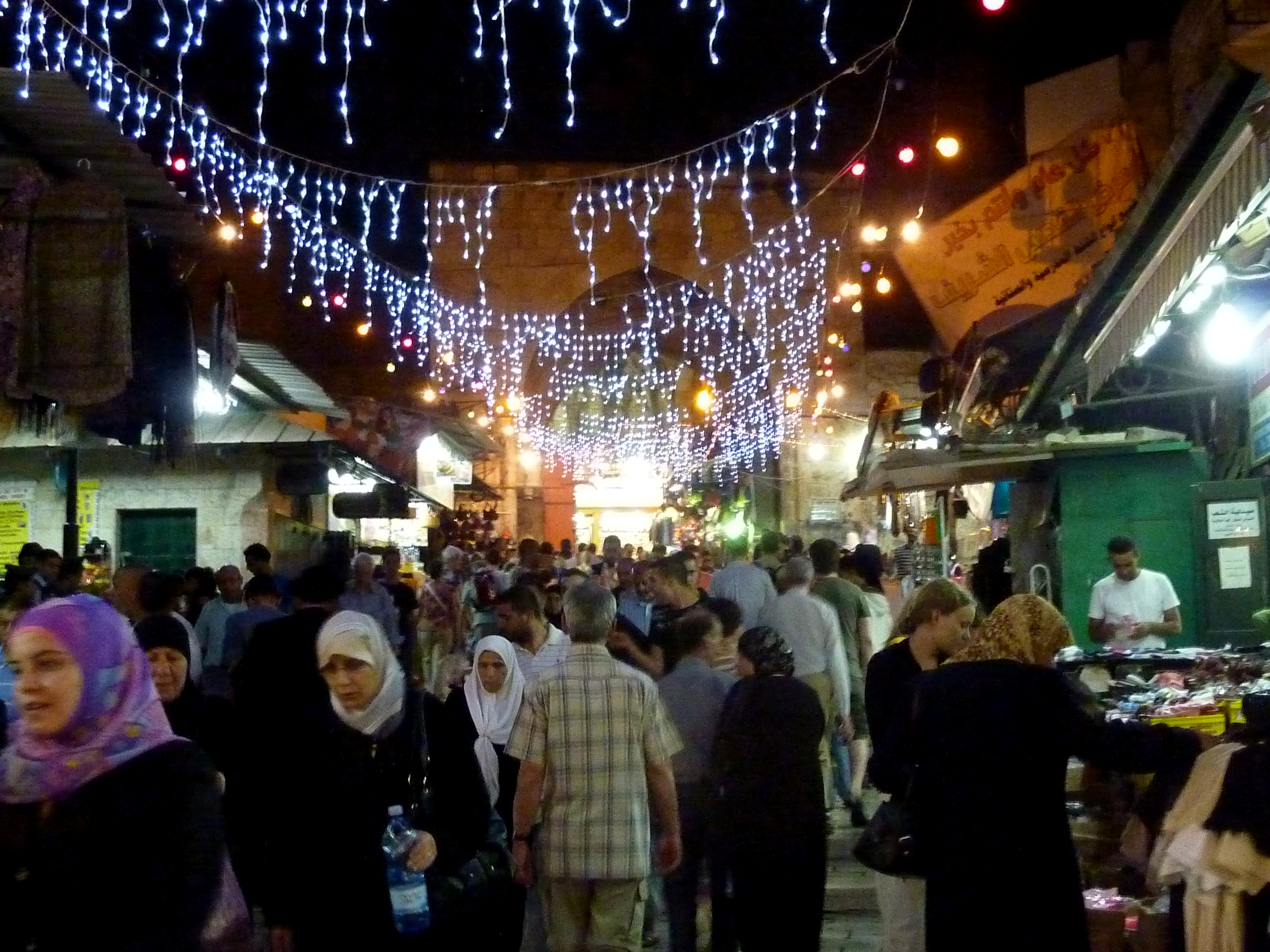 P1170378 Jerusalem